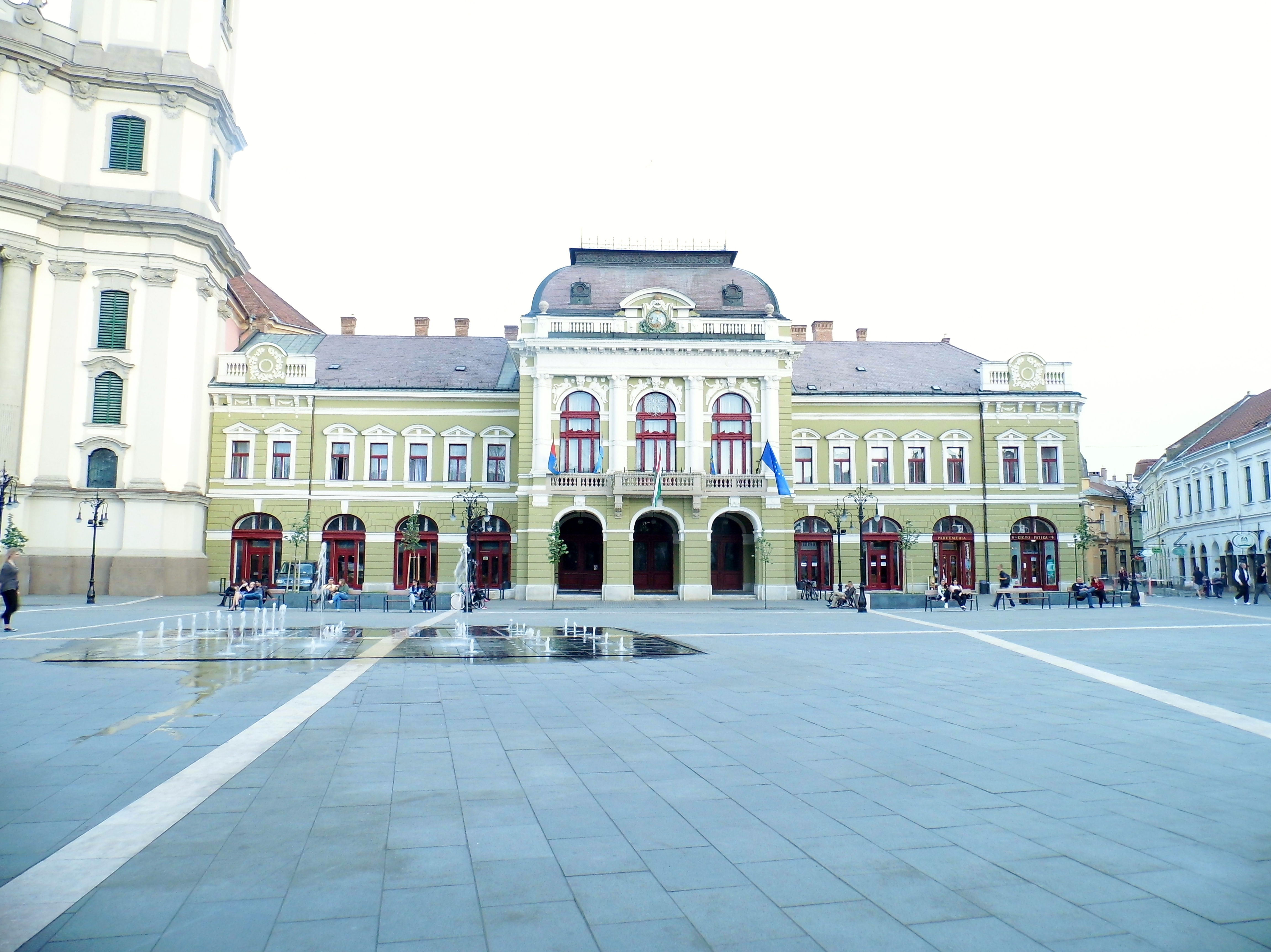 Egri városháza, Dobó tér 2.